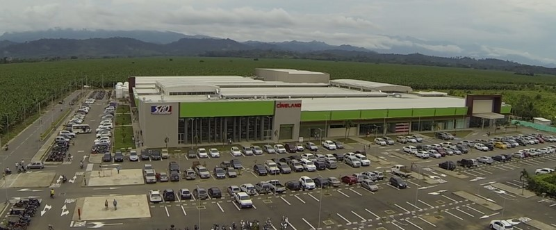 Centro Comercial Nuestro Uraba